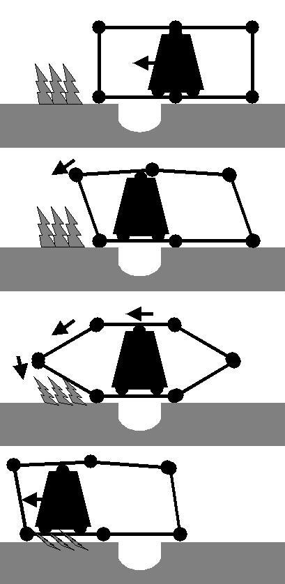 Boirault machine mouvements